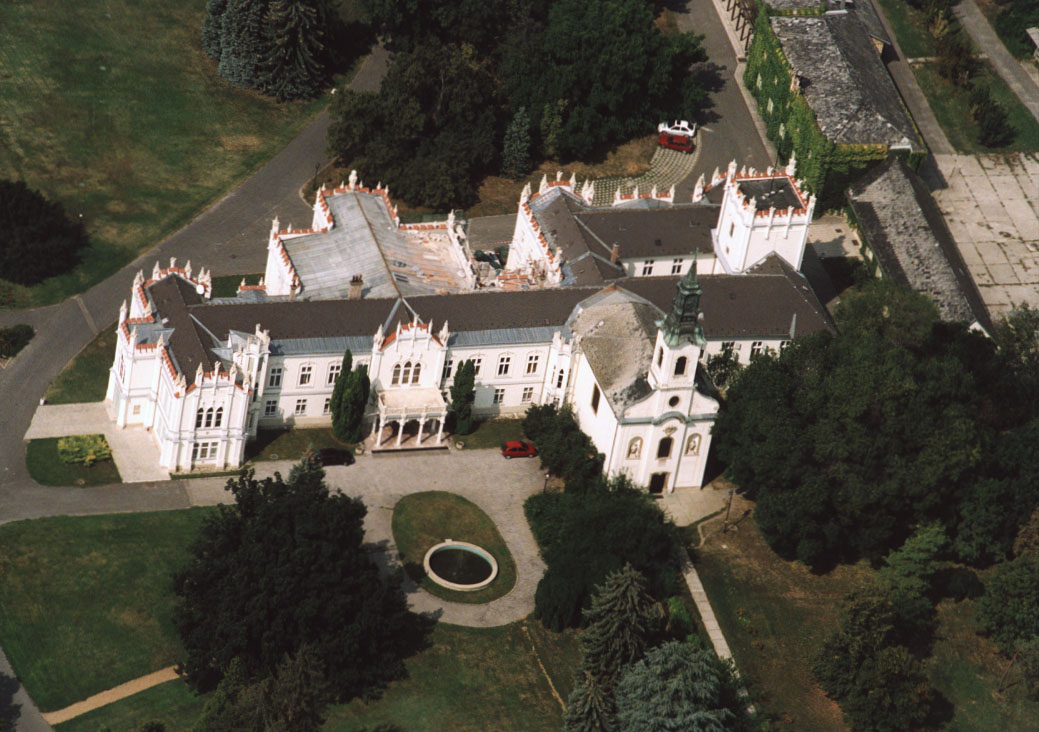 Palace - Martonvásár - Hungary - Europe